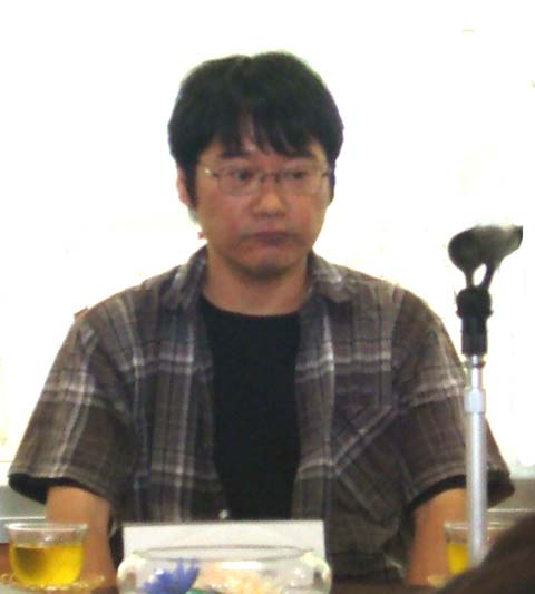 藤原芳秀、日本の漫画家